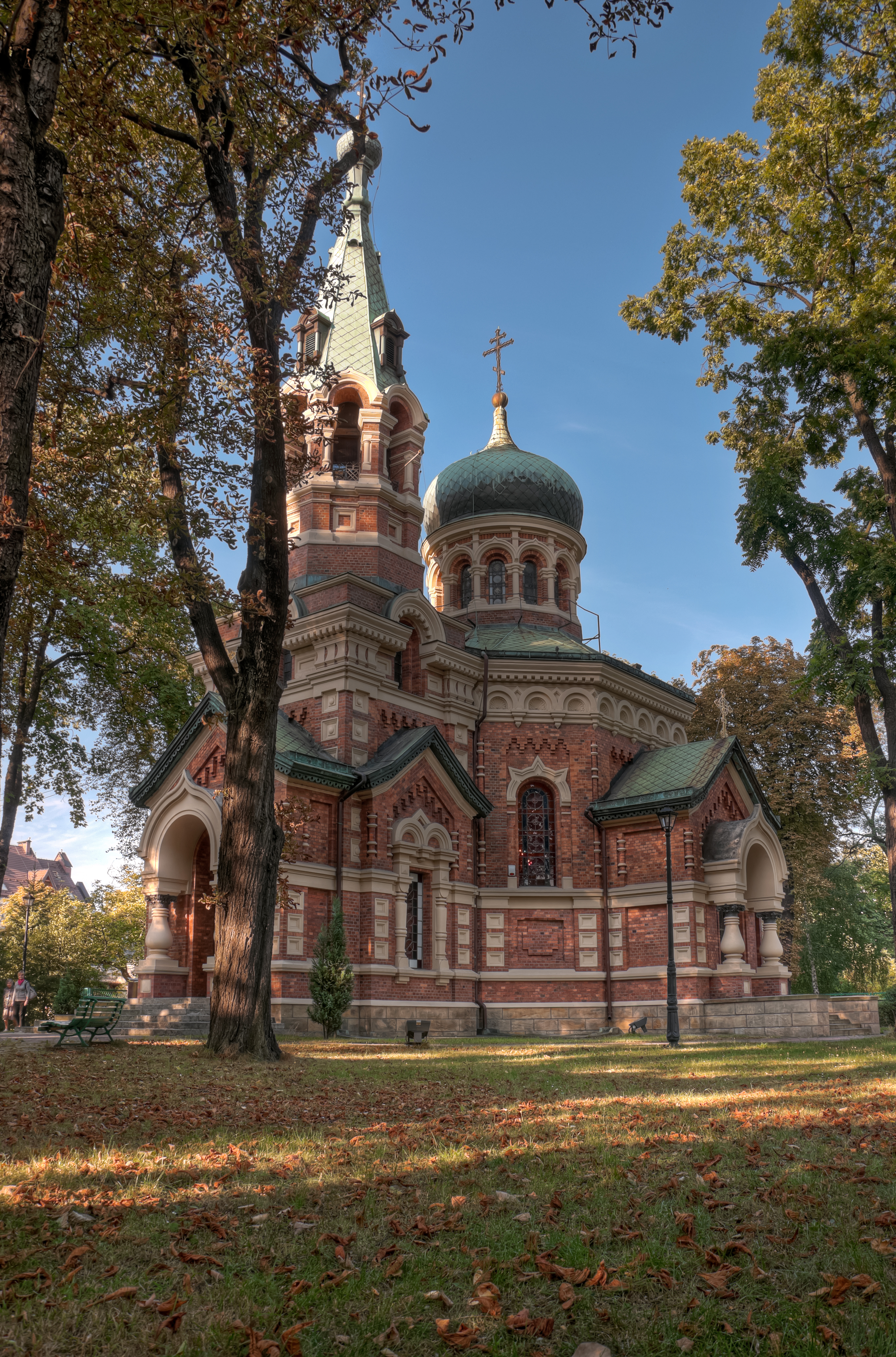 Cerkiew prawosławna par. p.w. Wiary, Nadziei i Miłośc w Sosnowcu